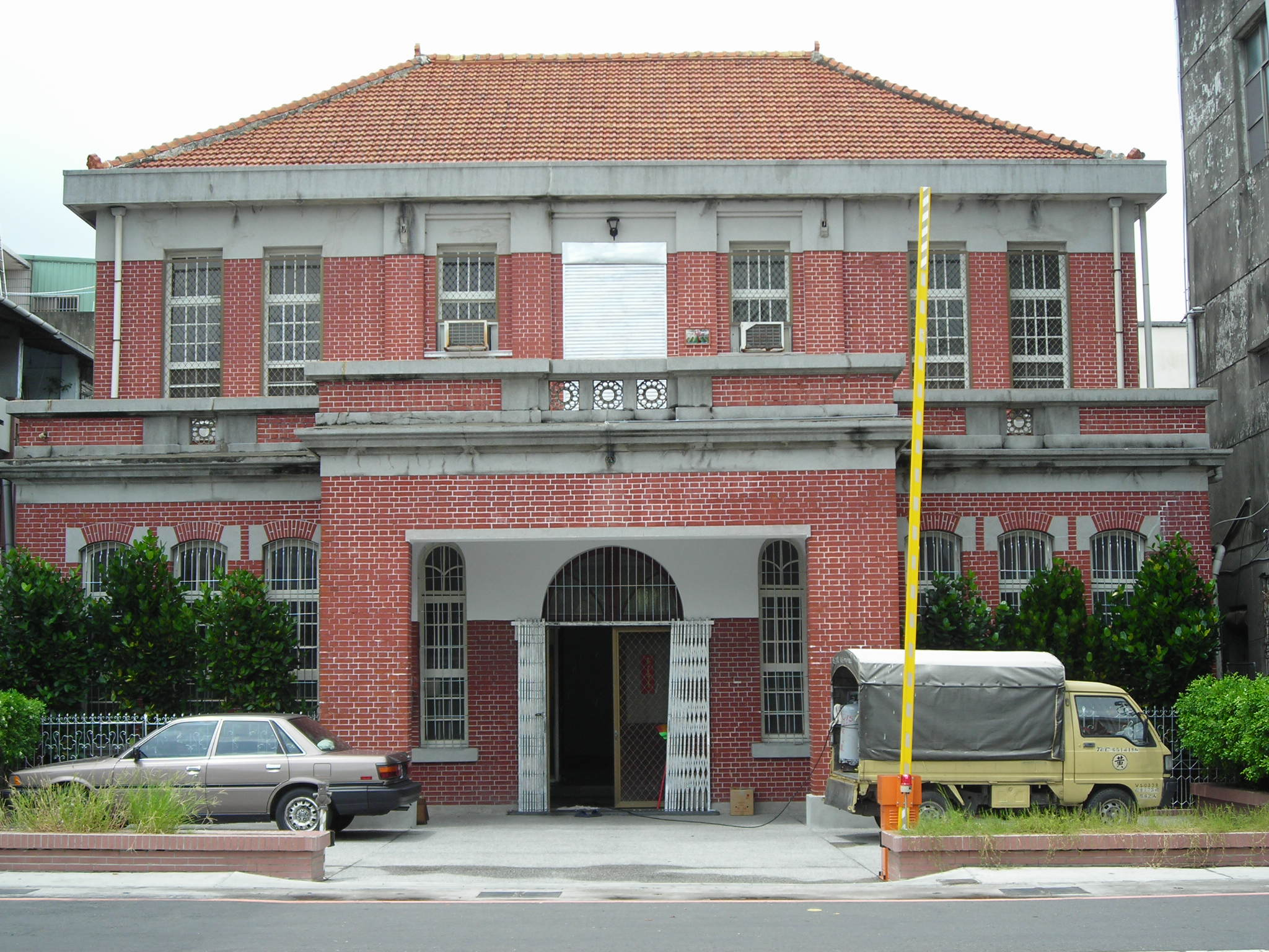 今日的永光行